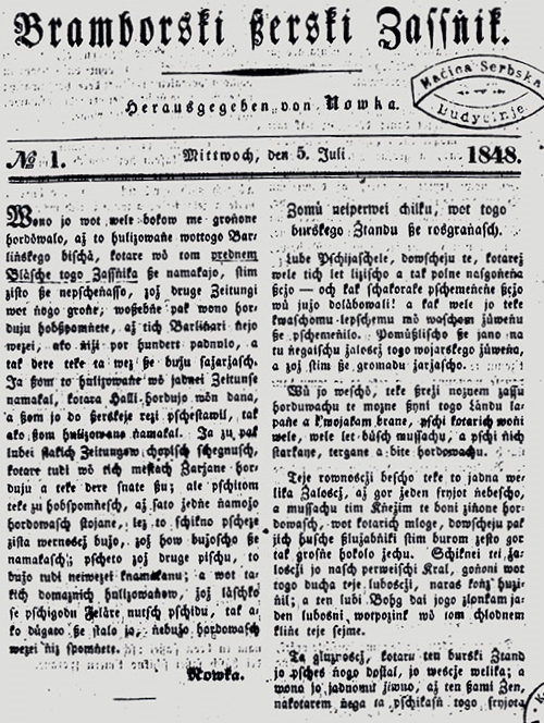 Серболужицкий еженедельник Bramborski Serbski Casnik, №1